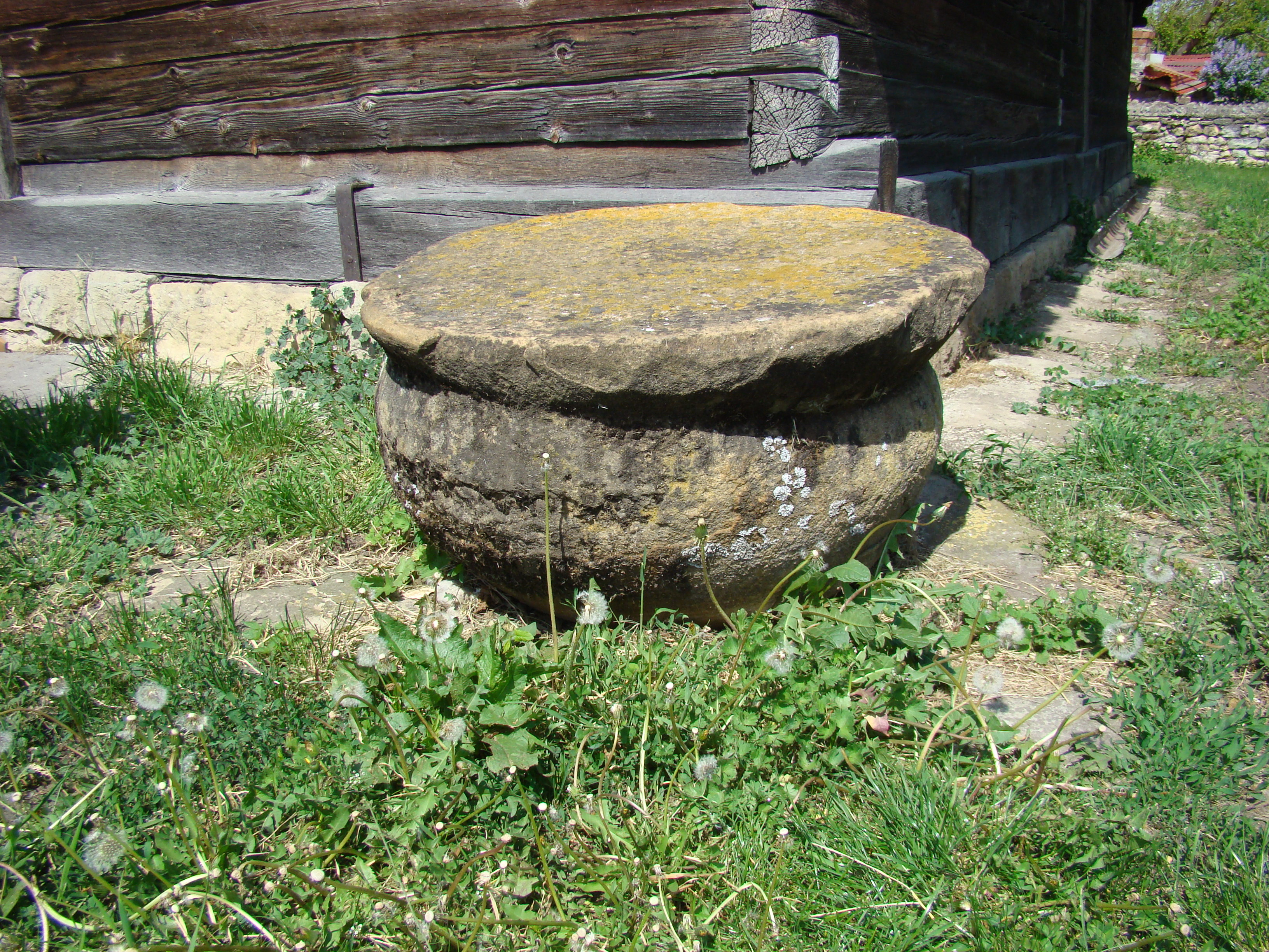 Biserica de lemn din Apahida, județul Cluj